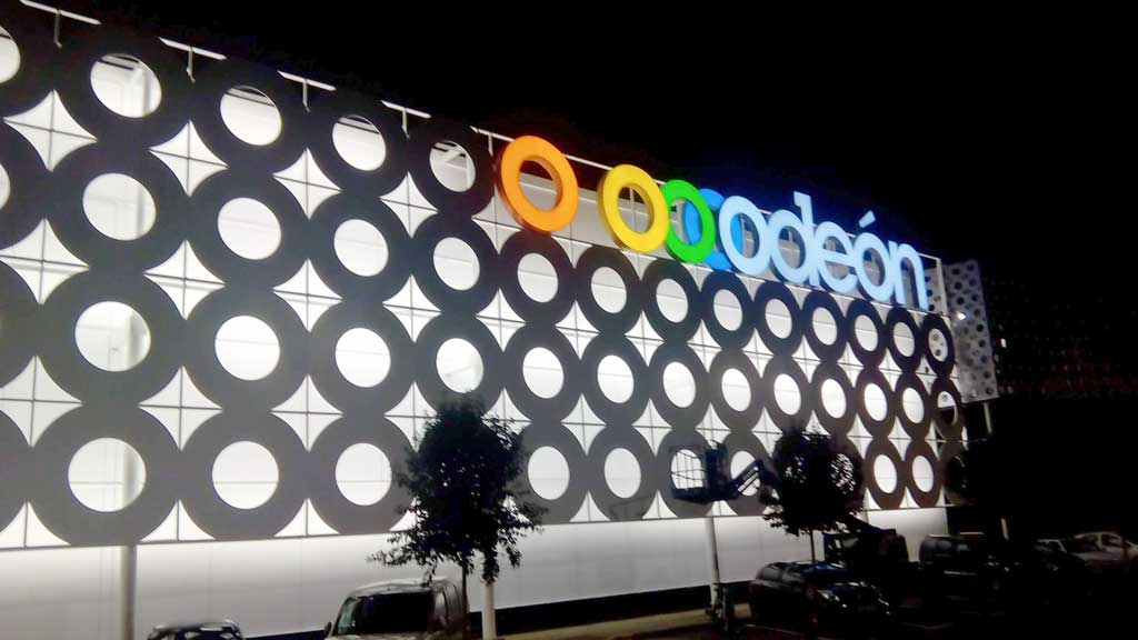 Imaxe de Odeón, Narón.